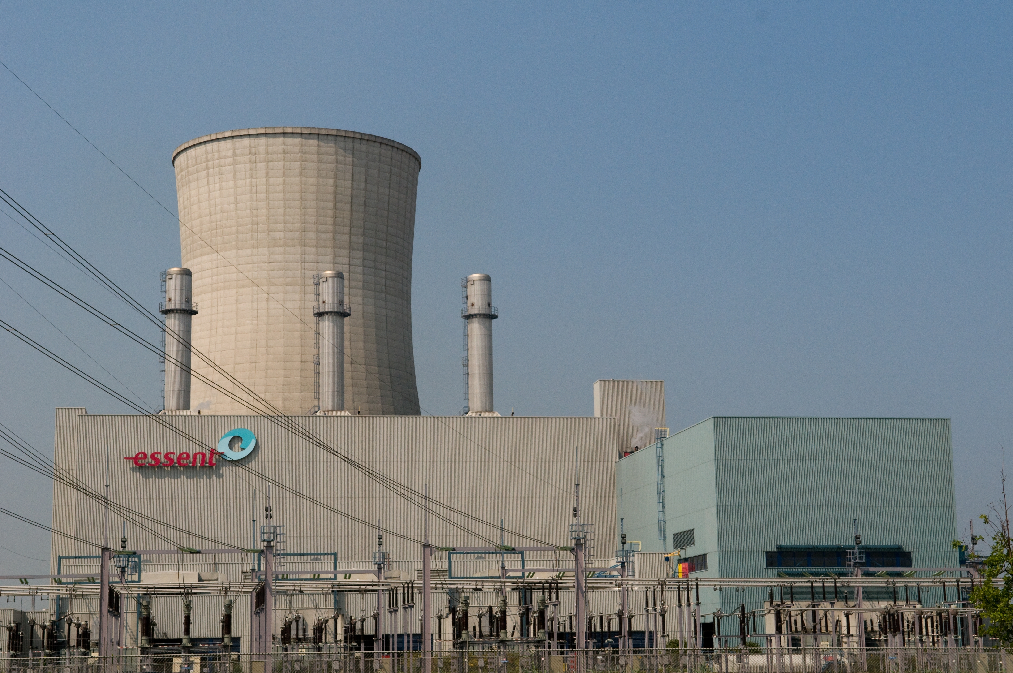 De Moerdijkcentrale van Essent.